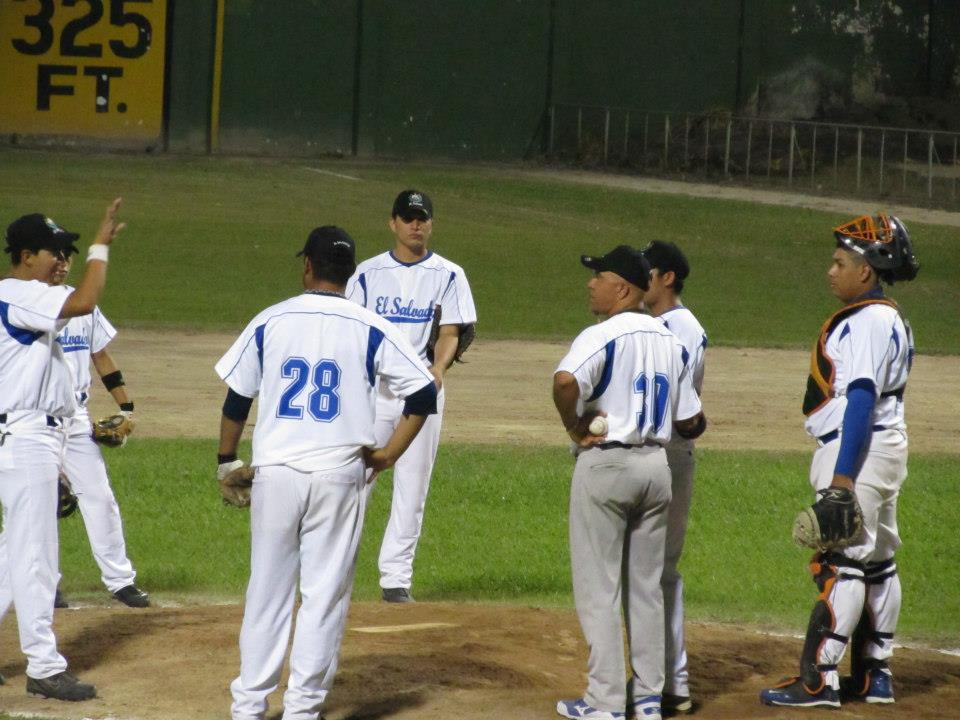 el equipo mayor de la selección de beibol